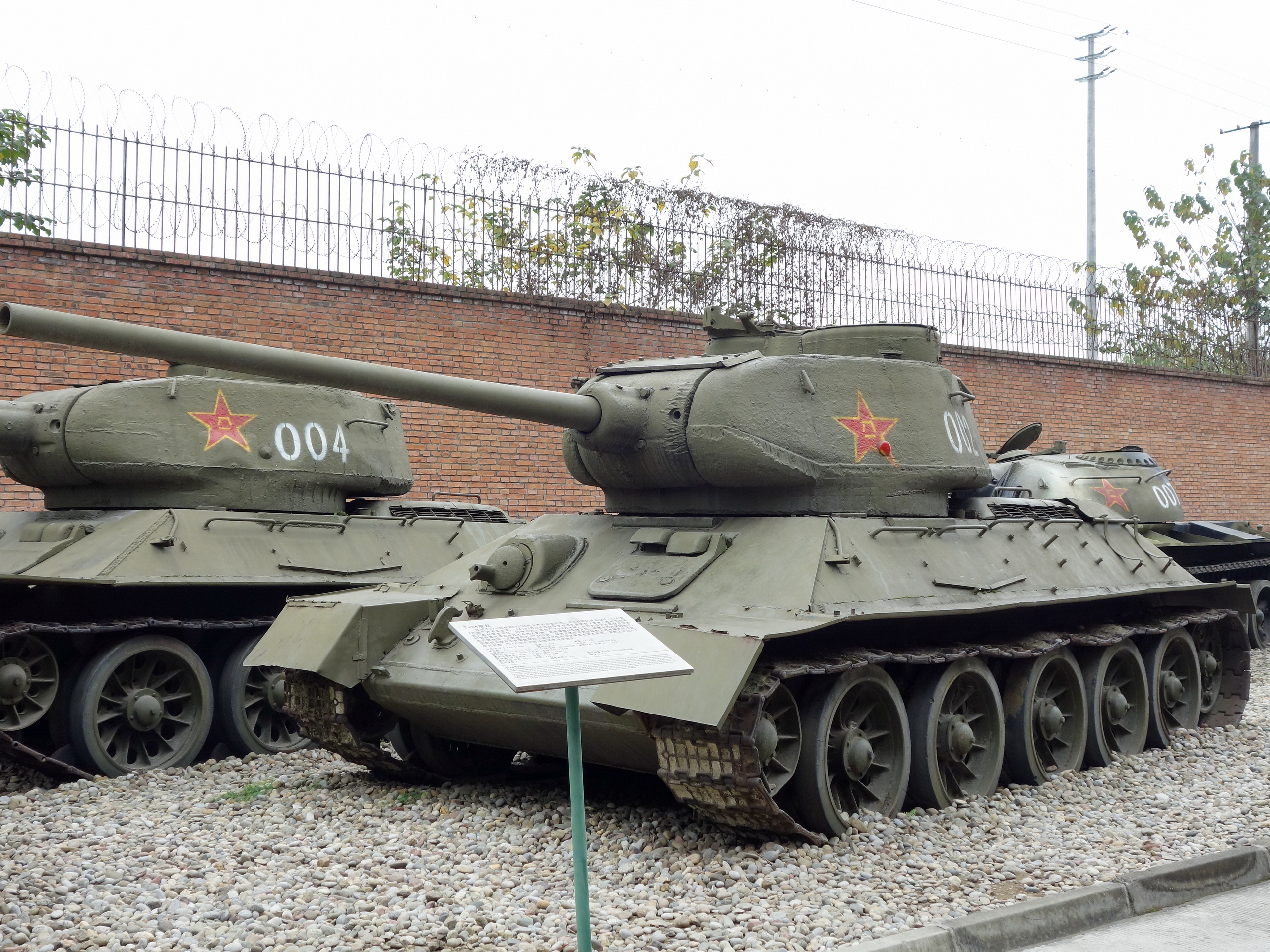 T-34/85坦克，收藏在建川博物馆。中国军队装备的T-34/85坦克进行了改进，明显外观特征是炮塔上面增加一个指挥塔。